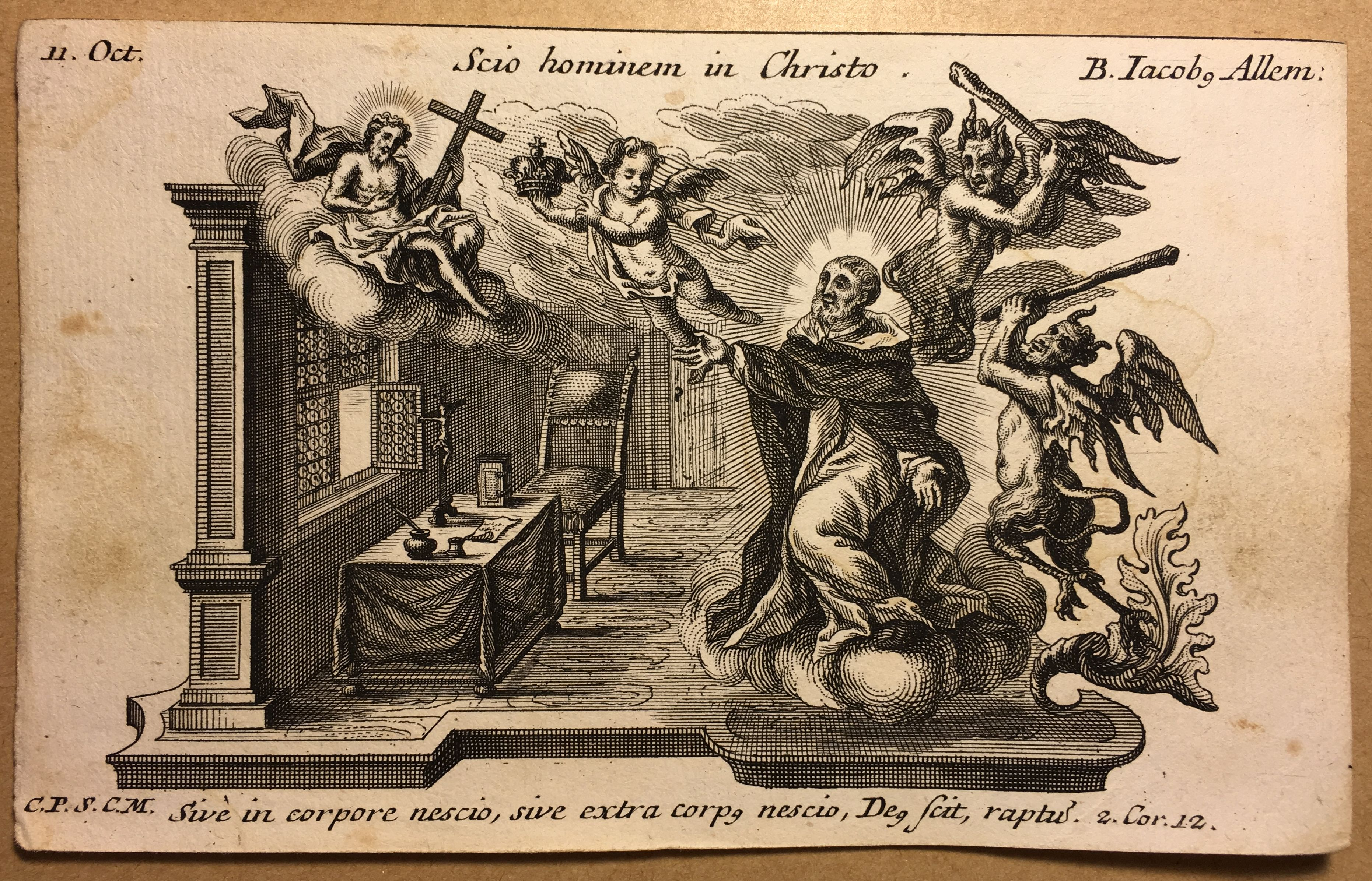 Darstellung des seligen Jakob Griesinger aus dem Annus dierum Sanctorum (erschienen in Augsburg)